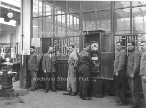 Fotografia di operai alla timbratura all'entrata dell'officina ricambi dello stabilimento Fiat di corso Dante, Torino (Fiat Group Marketing & Corporate Communication spa, Archivio iconografico, Album tematici, album 87)